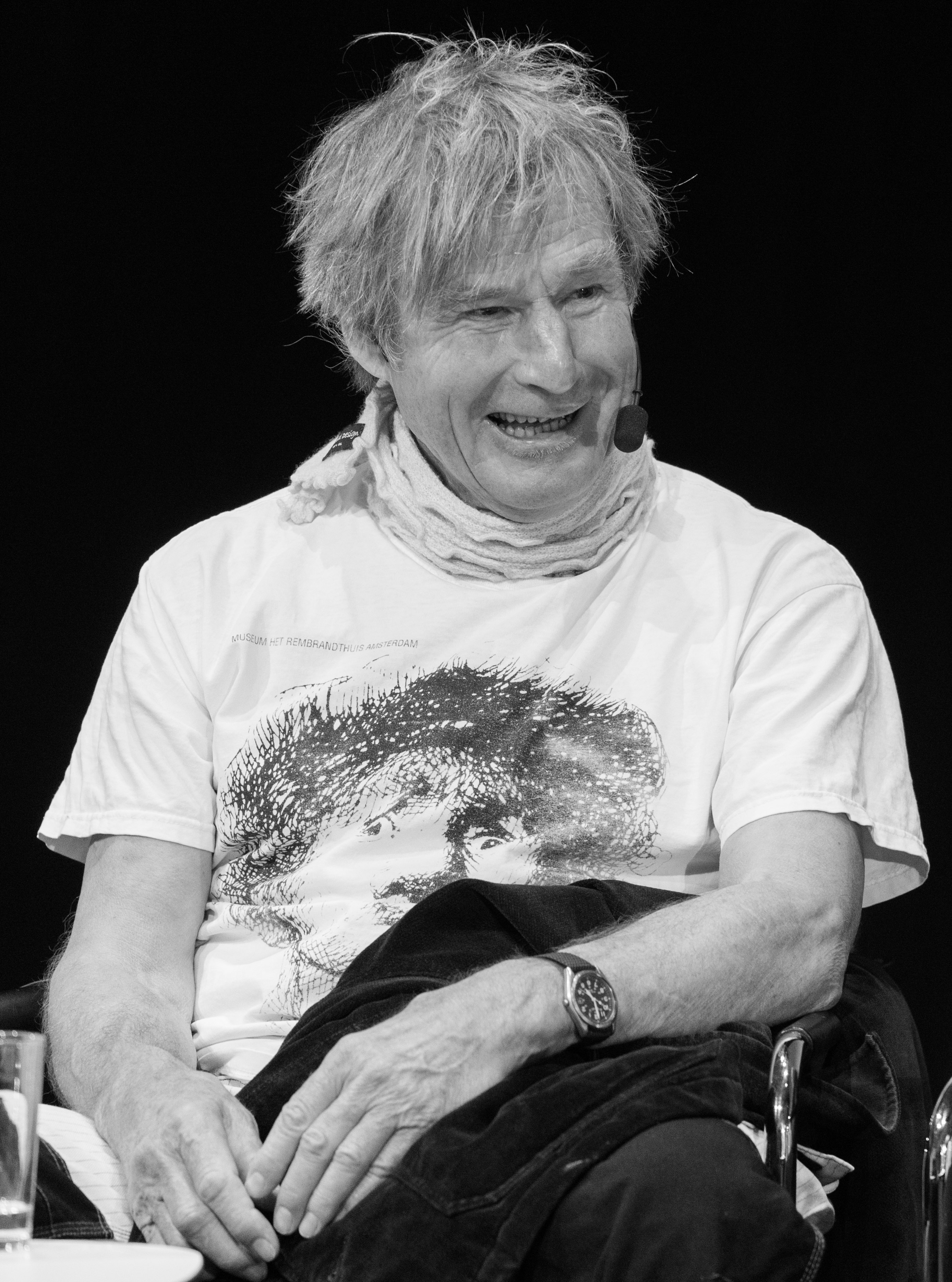 Niklas Ek på Gannevik Talks på Kulturhuset i Stockholm den 24 maj 2015.